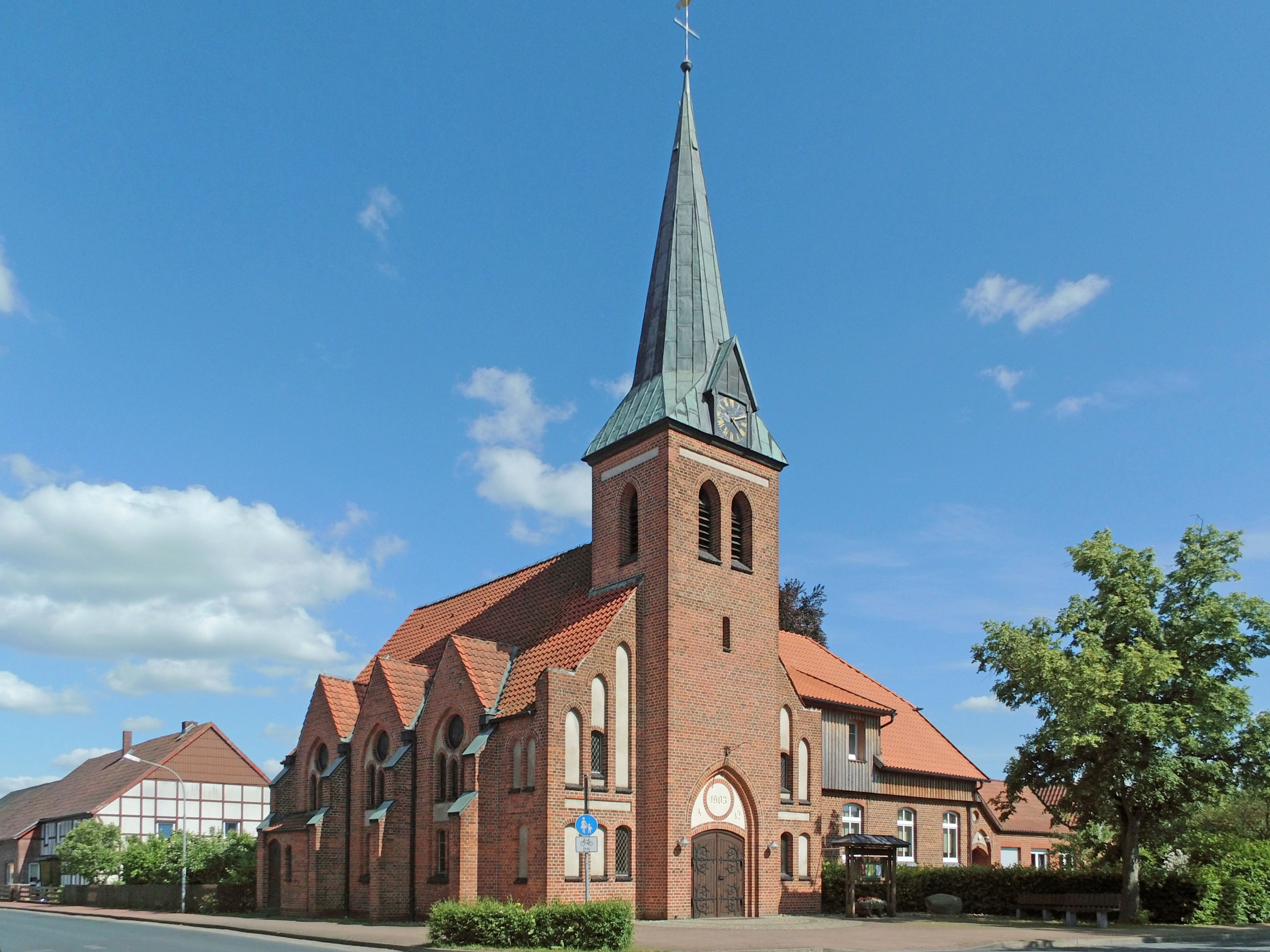 Evangelisch-lutherische Michaelis-Kirche in Ehra (Landkreis Gifhorn)